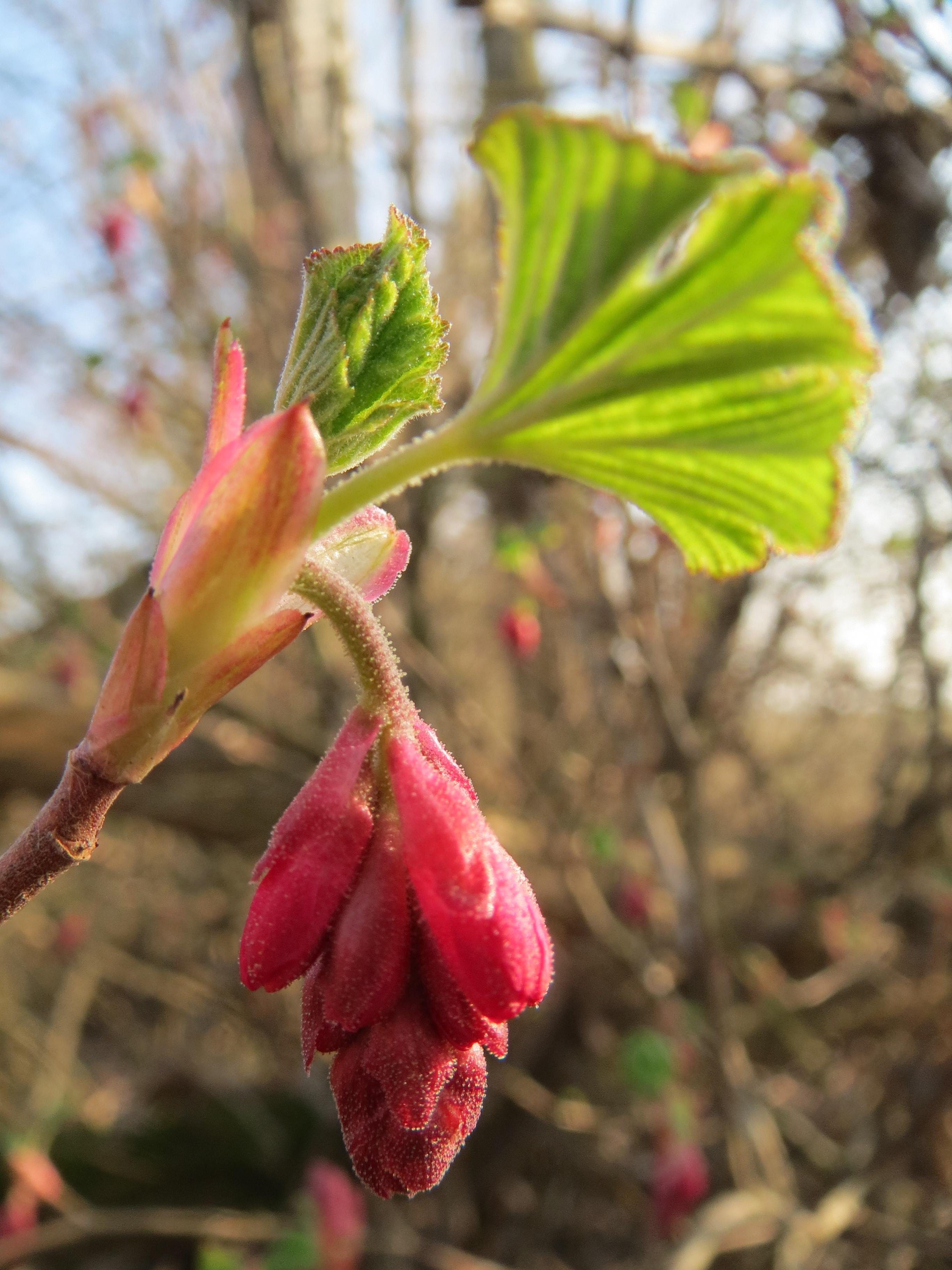 Blut-Johannisbeere (Ribes sanguineum) im Naturschutzgebiet Holzgraben